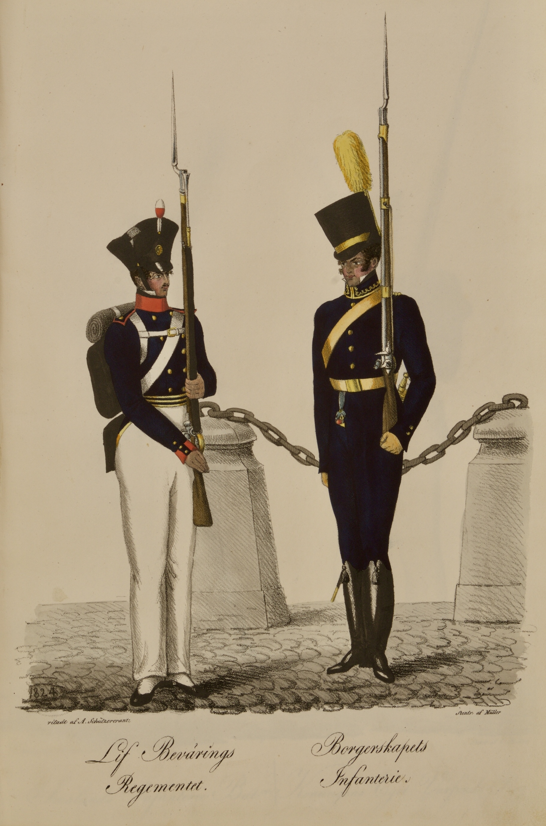 Tillhör Armémuseums arkiv